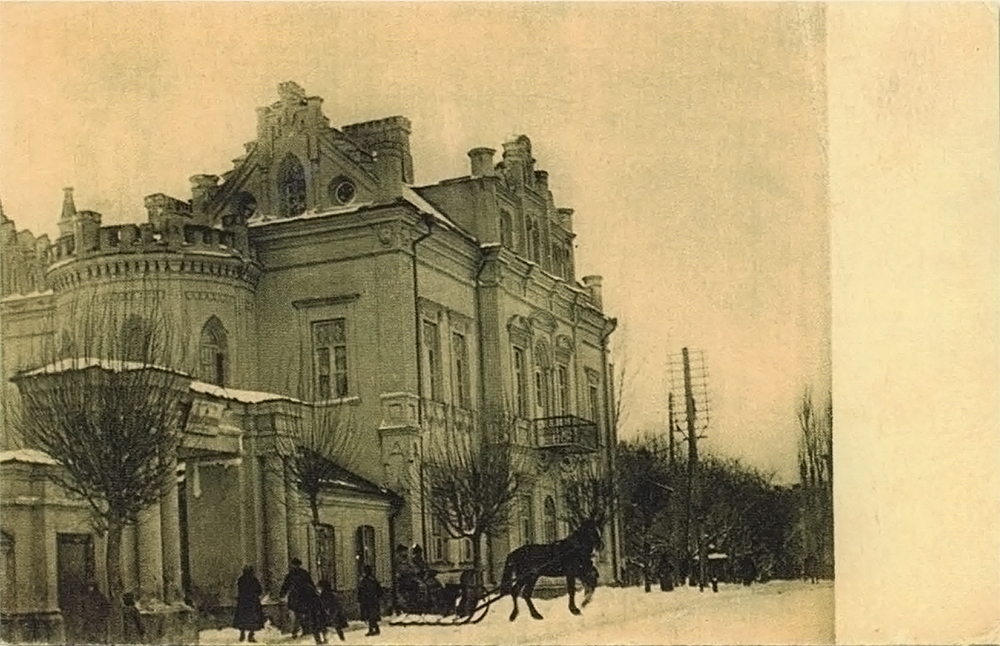 Беларуская (тарашкевіца): Менск (Miensk), вуліца Кашарская (vulica Kašarskaja). Дом Гаўсмана (Haŭsman), Шляхецкі сход